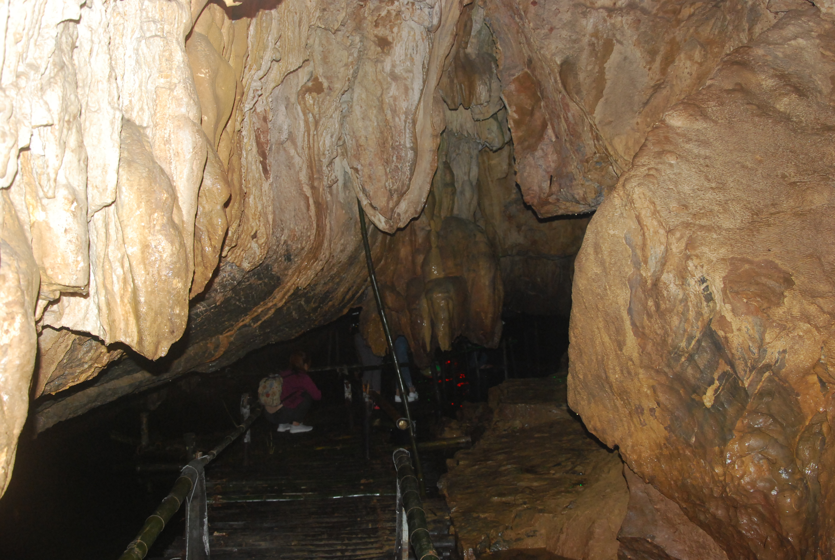 Động Tiên Cá thuộc Thung Nham trong Quần thể di sản thế giới Tràng An